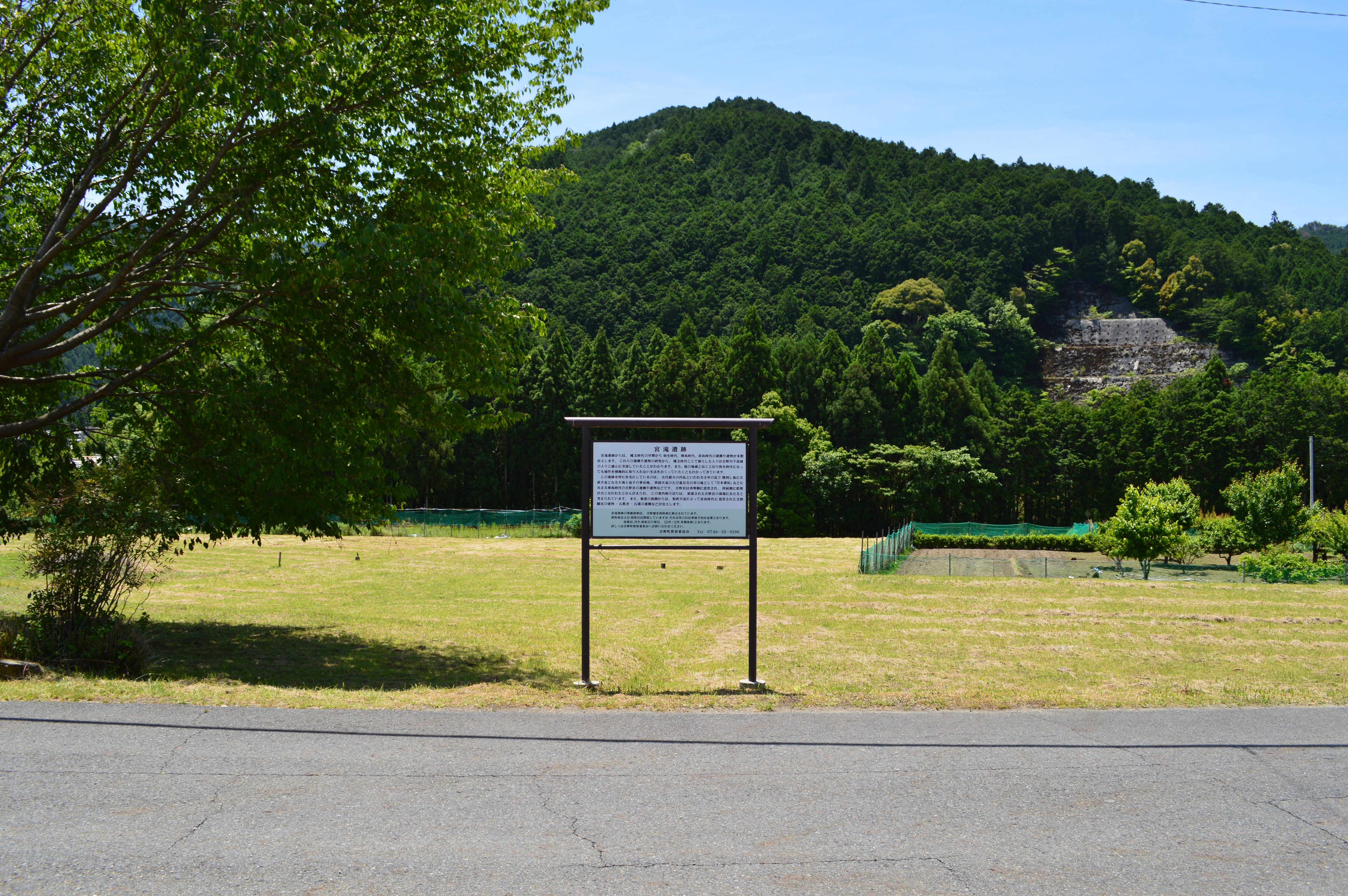 宮滝遺跡 説明板付近